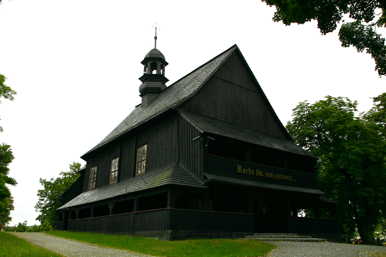 Dobrzeń Wielki - kościół odpustowy pw. św. Rocha (1658, 1752, 1928, 1958 i 2006)